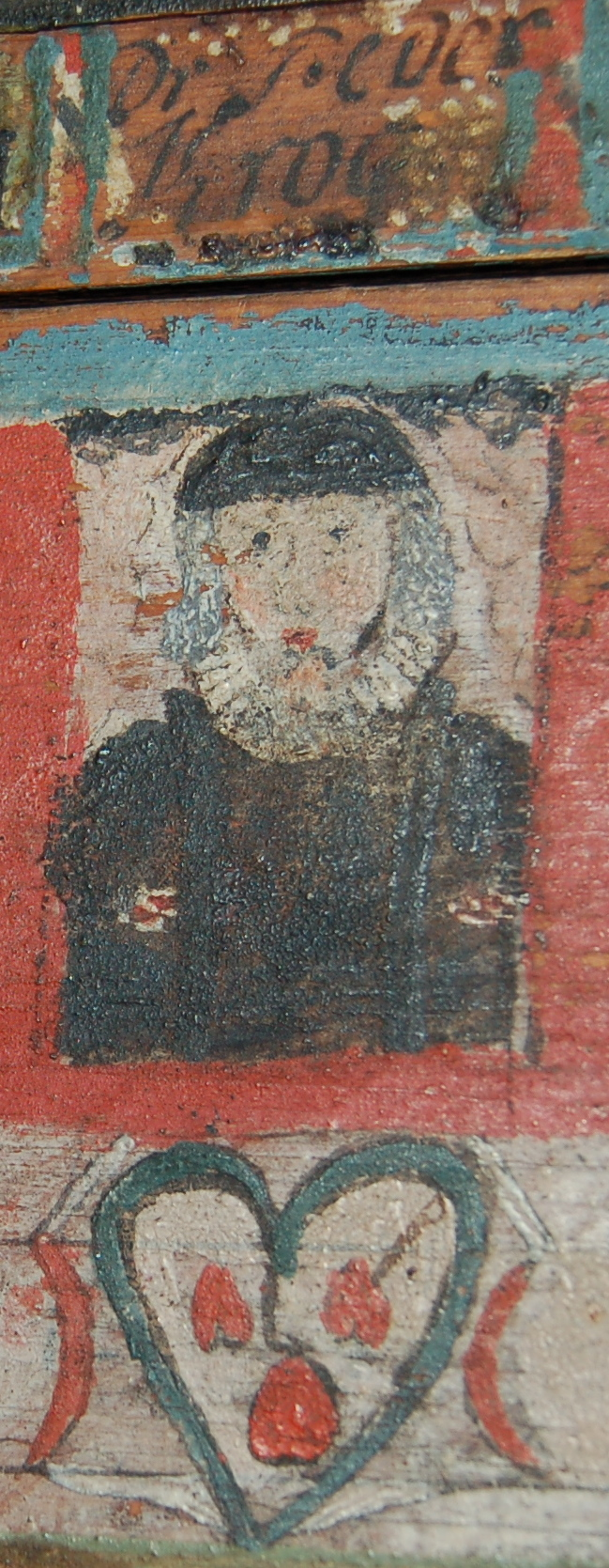 Biskop i Trondheim Peder Krog, malt av presten Sigvard Kildal, nå i Tromsø museum